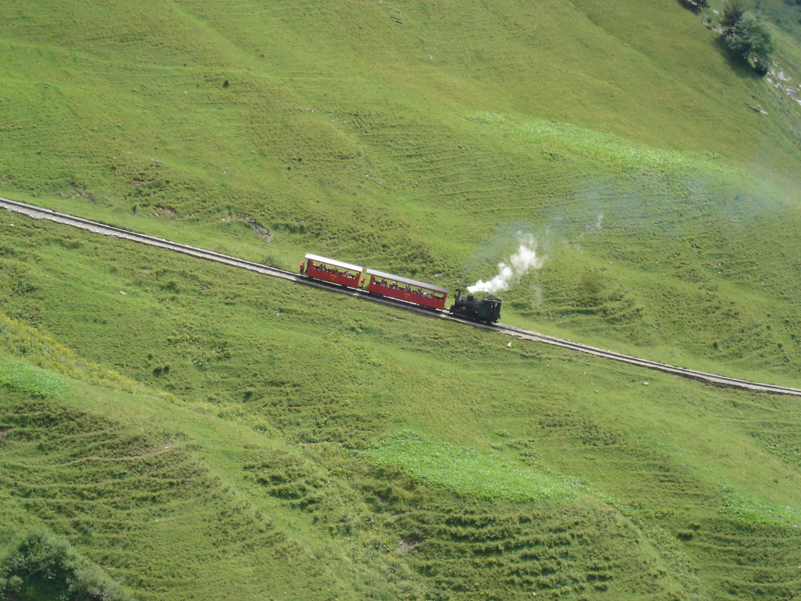 Brienzer Rothorn Bahn Lok Nr 6 Bergfahrt an Mittlesten